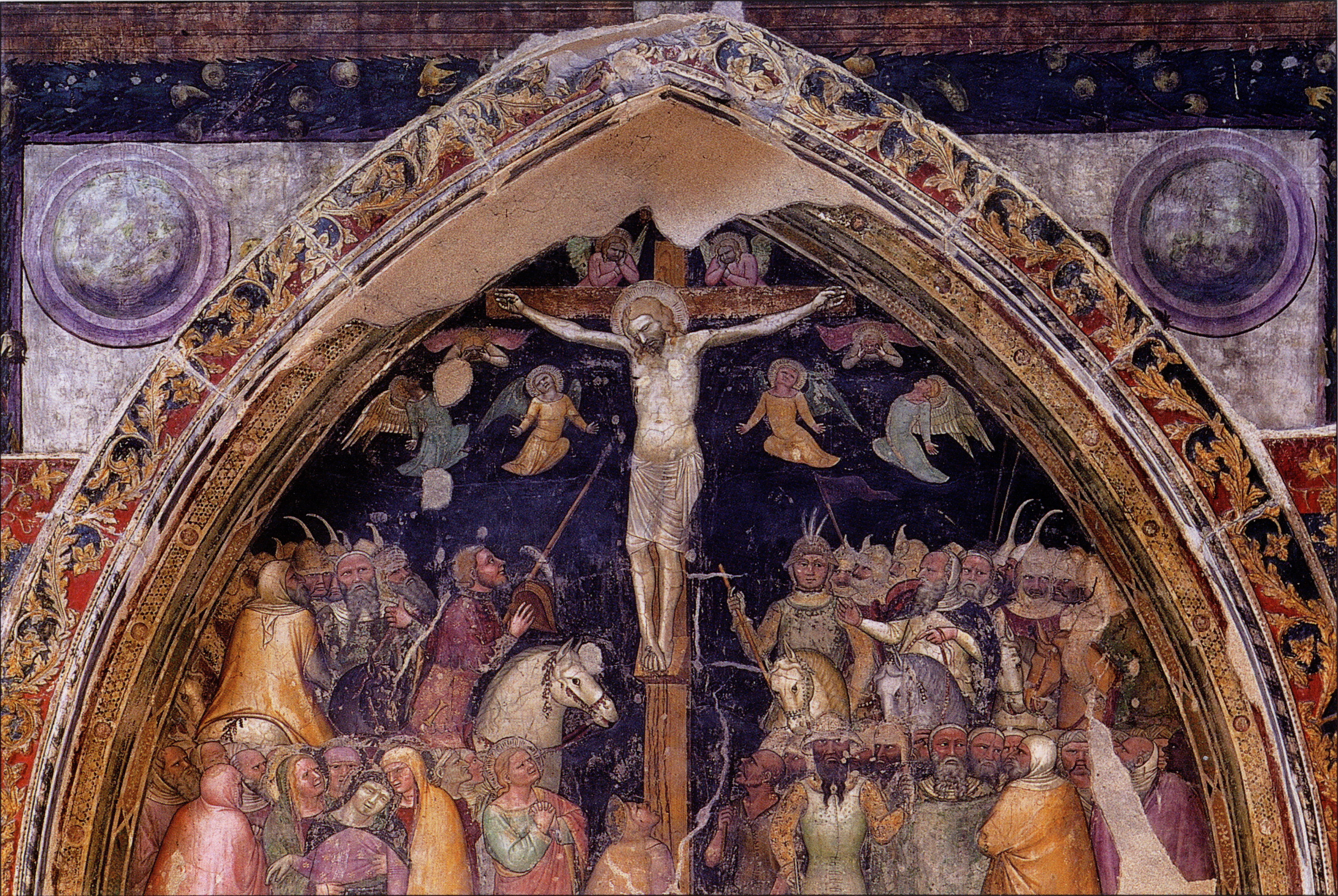 Verona - San Fermo - Turone (attribuito) - Crocifissione